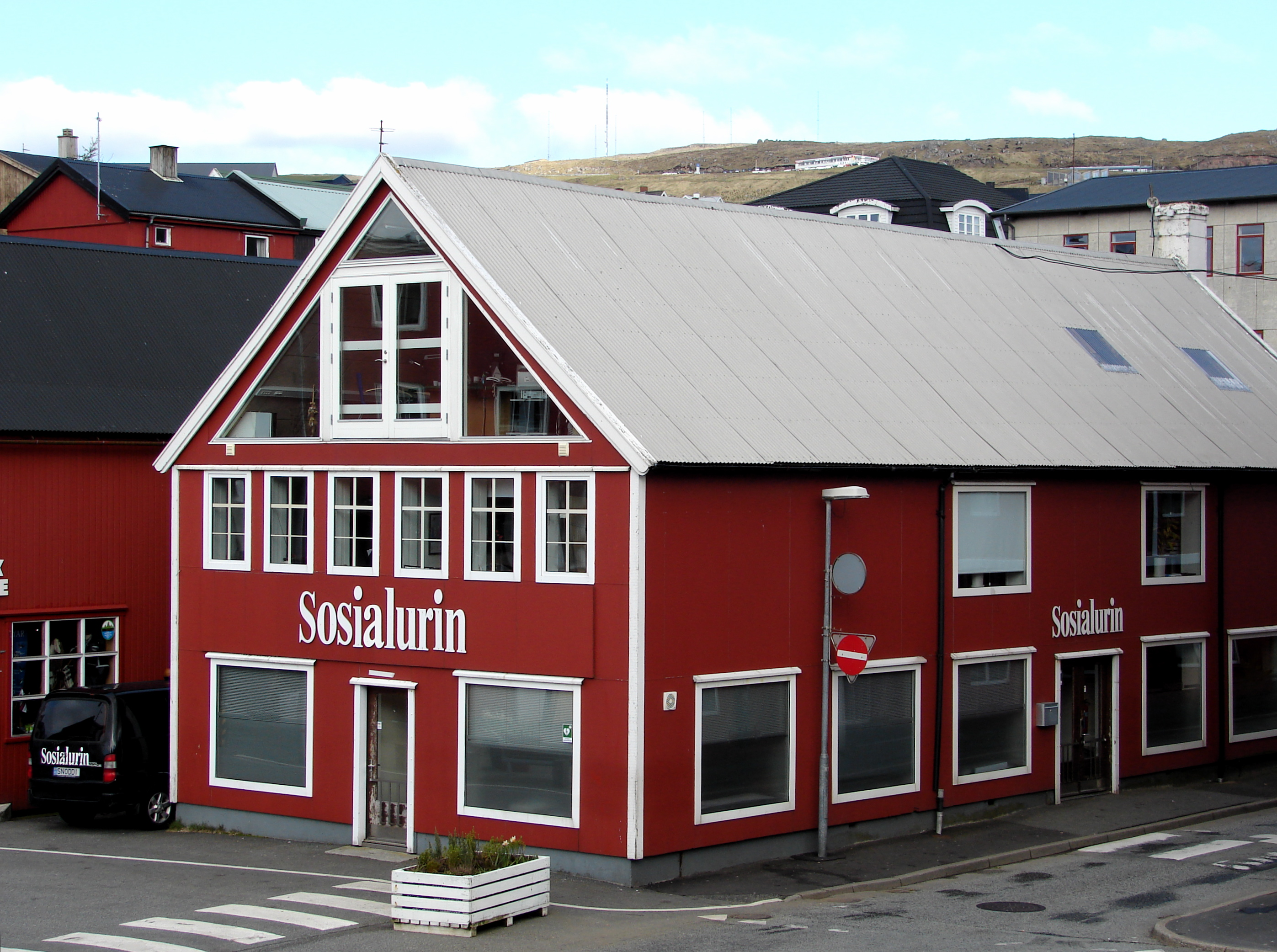 Fra Thorshavn, Færøerne